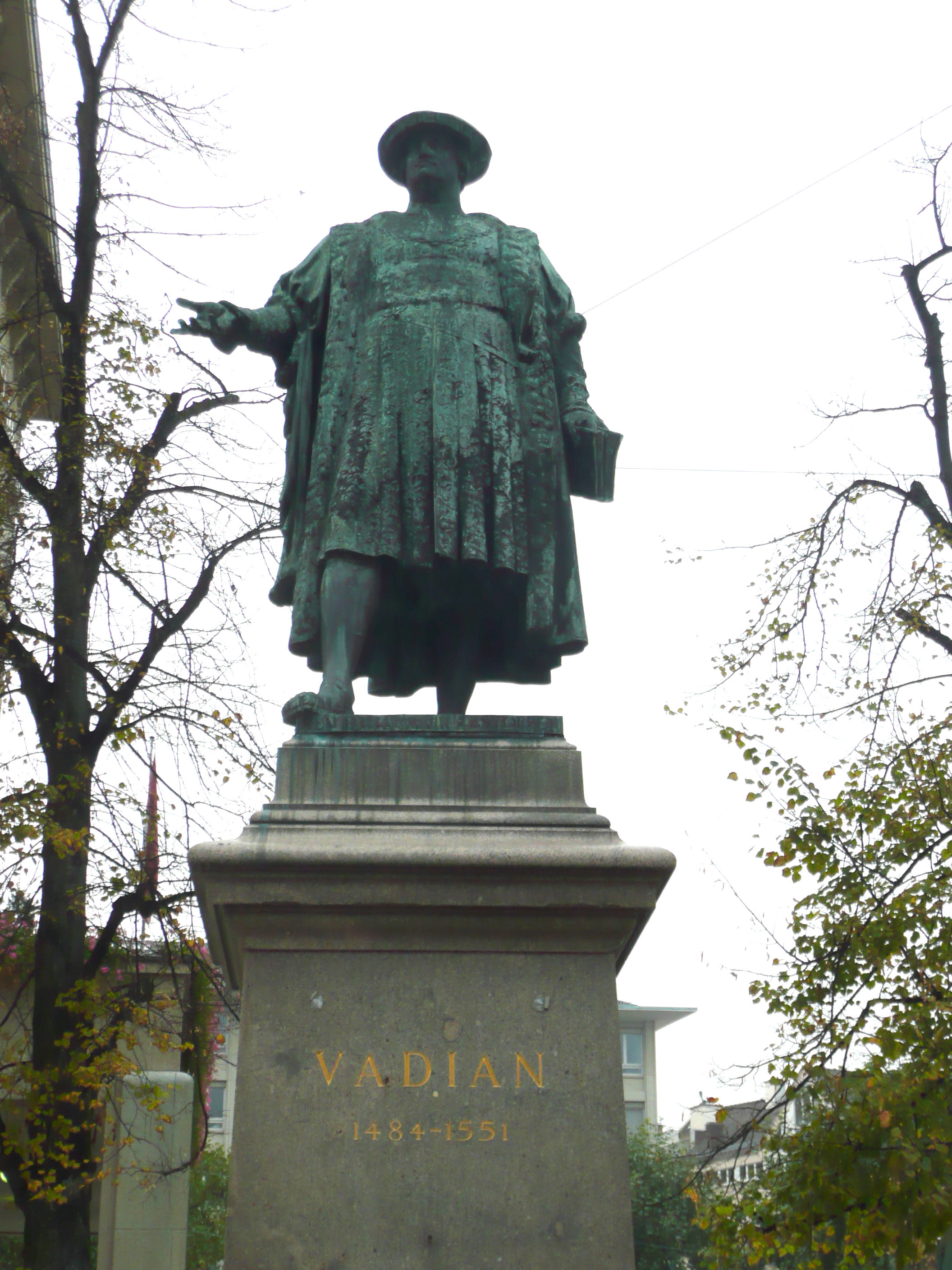 Die Vadianstatue in St. Gallen, 1904 von Richard Kissling (1848-1919) geschaffen.